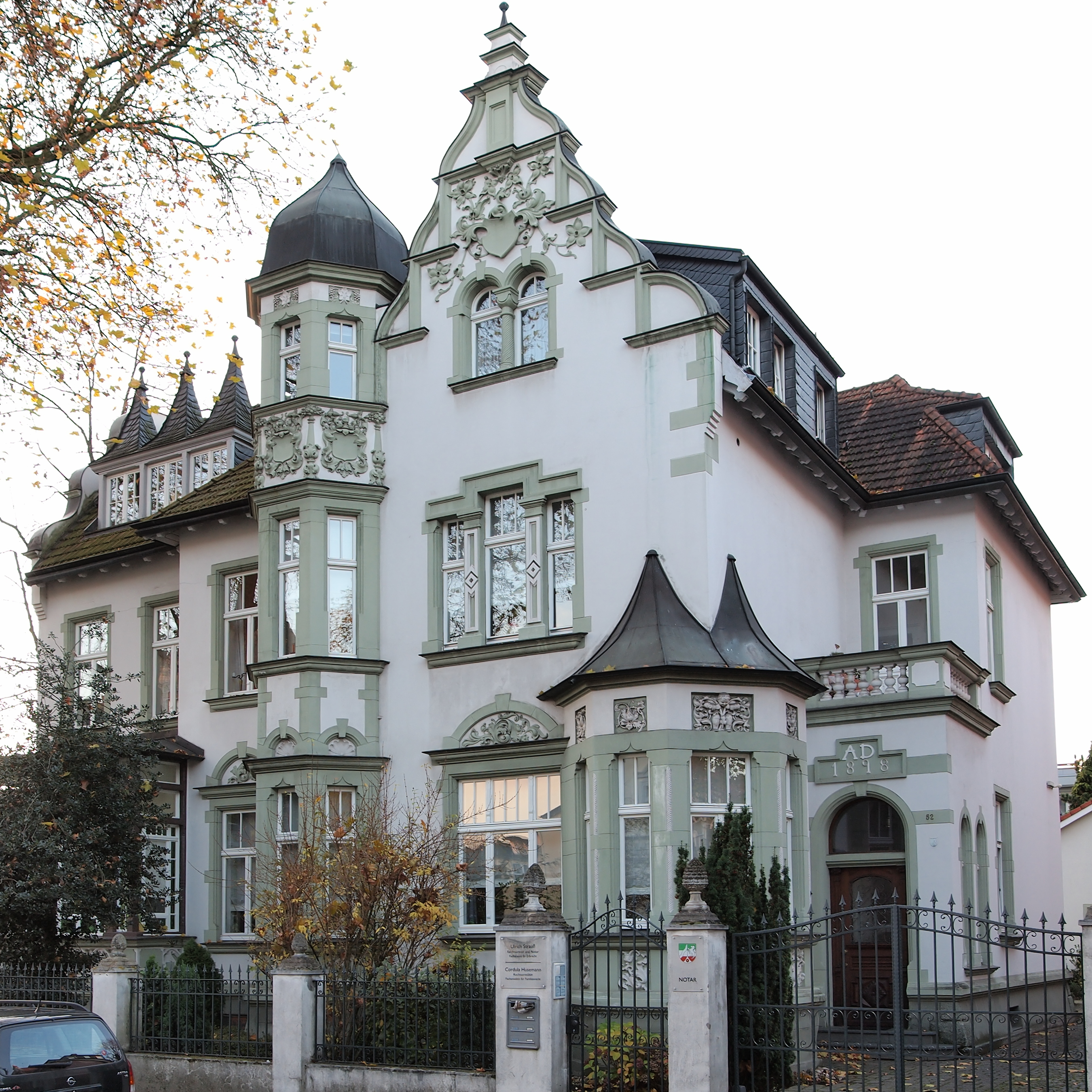 Wohn- und Geschäftsgebäude in Herne, Baudenkmal This is the photograph of an architectural monument. It is part of the list of cultural monuments of Herne, no. 21